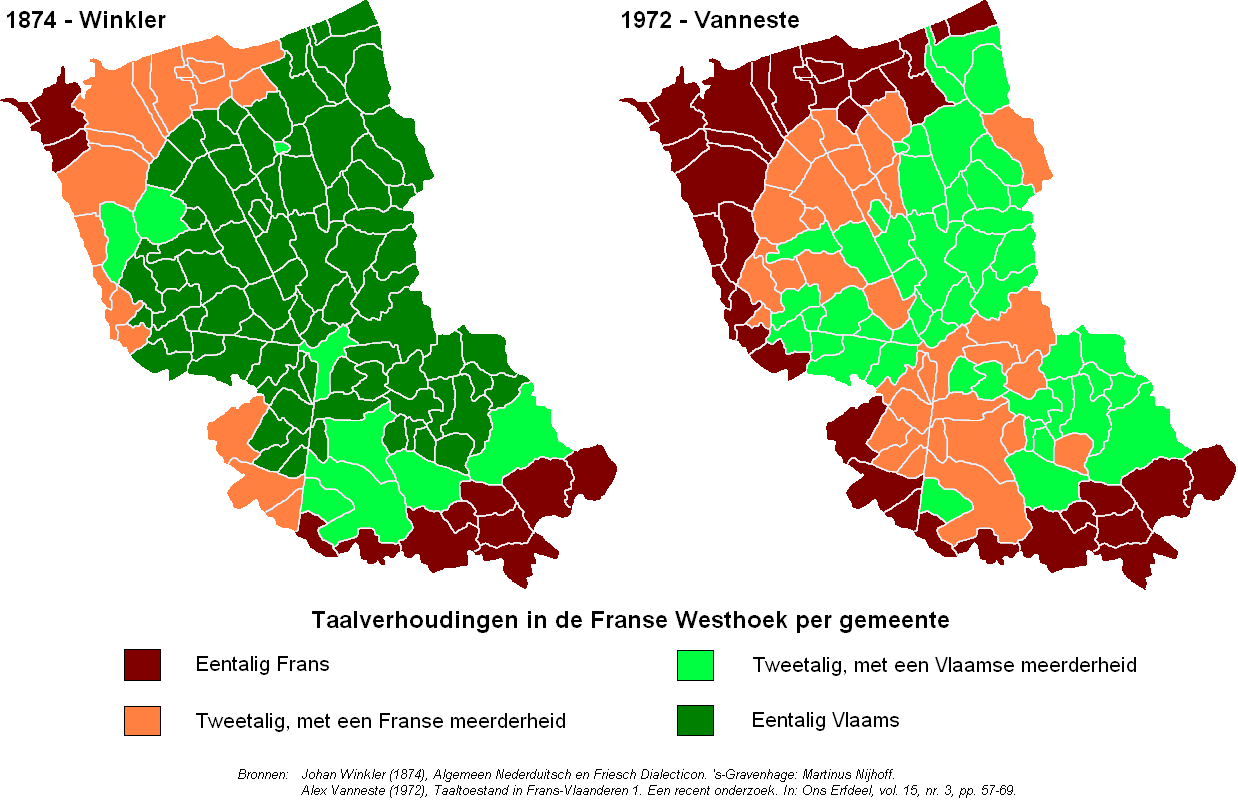 Taalverhoudingen in de Franse Westhoek, zelfgemaakt